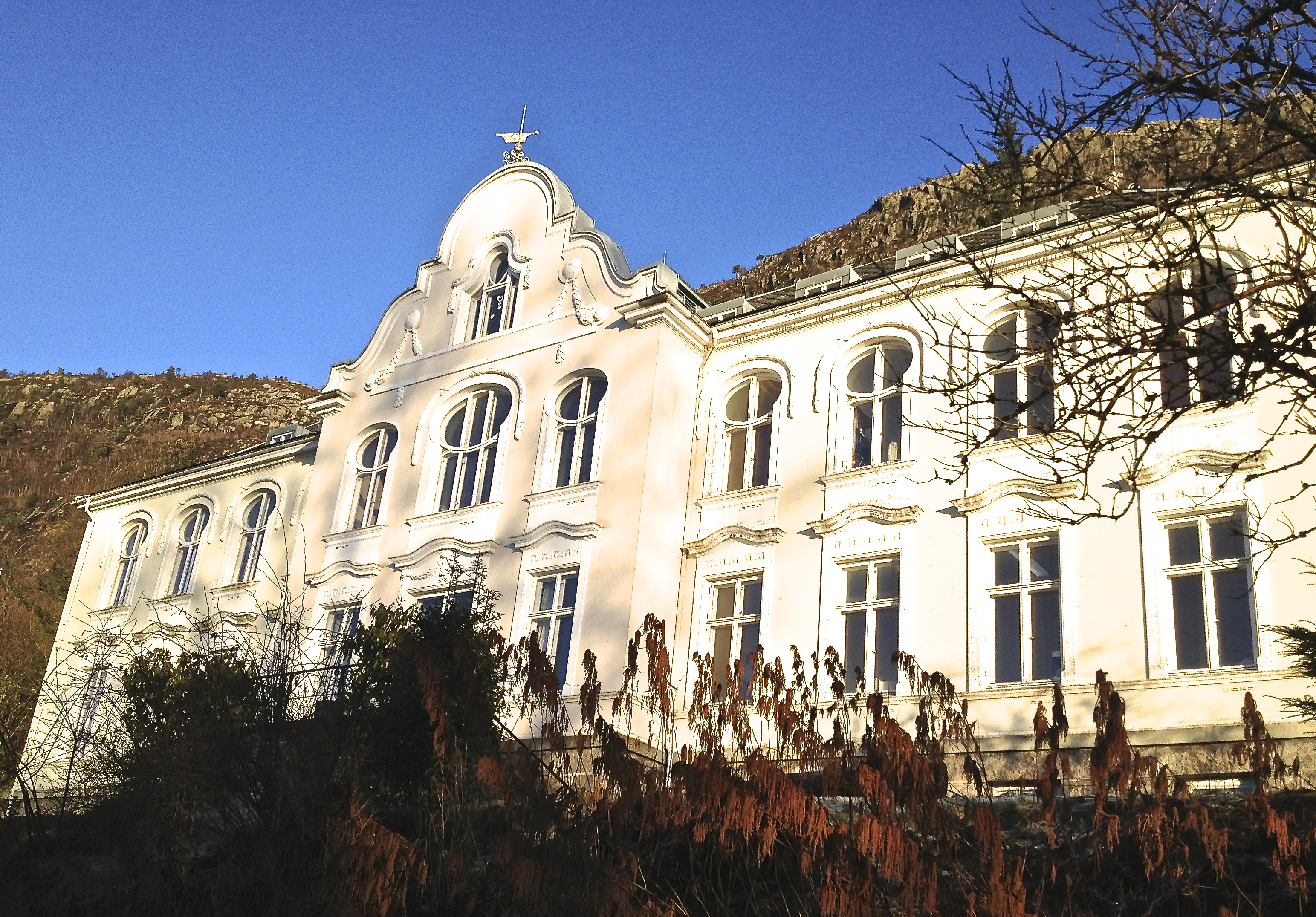 Tegnet av arkitekt Schak Bull i 1902, oppført 1903, tatt i bruk 1904.